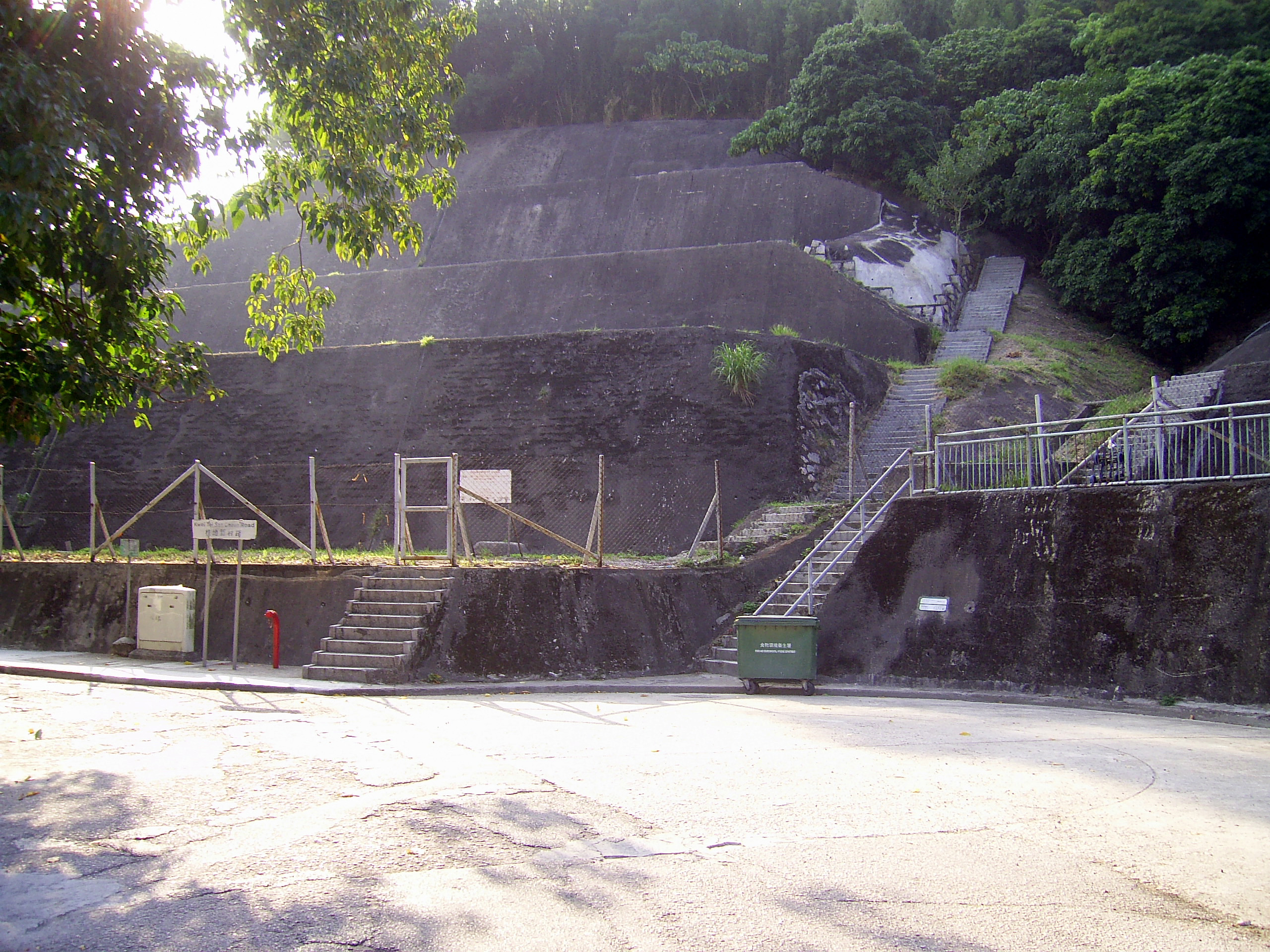 中文（香港）: 火炭平房區清拆後仍然空置